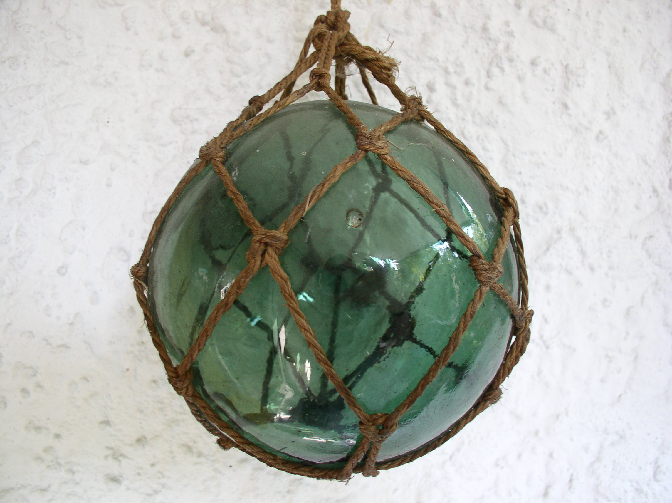 Eine alte Glaskugel die als Schwimmer für Fischernetze benutzt wurde 1950er Jahre aus Heiligenhafen (Germany; Schleswig-Holstein; Ostsee)